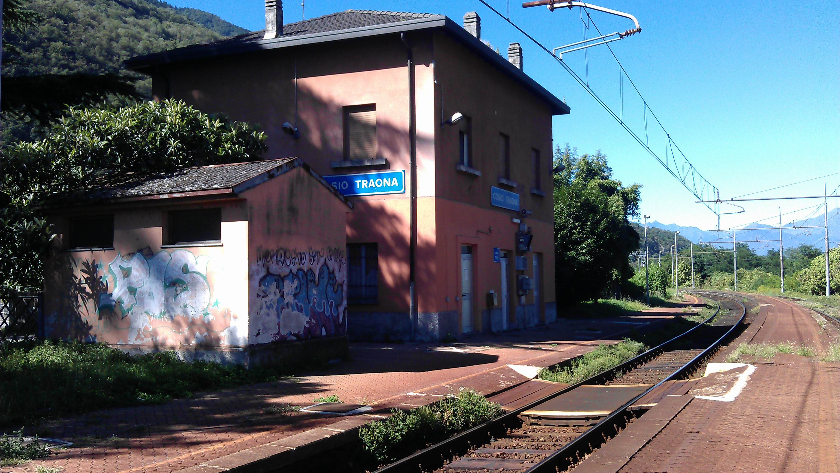 Fabbricato viaggiatori